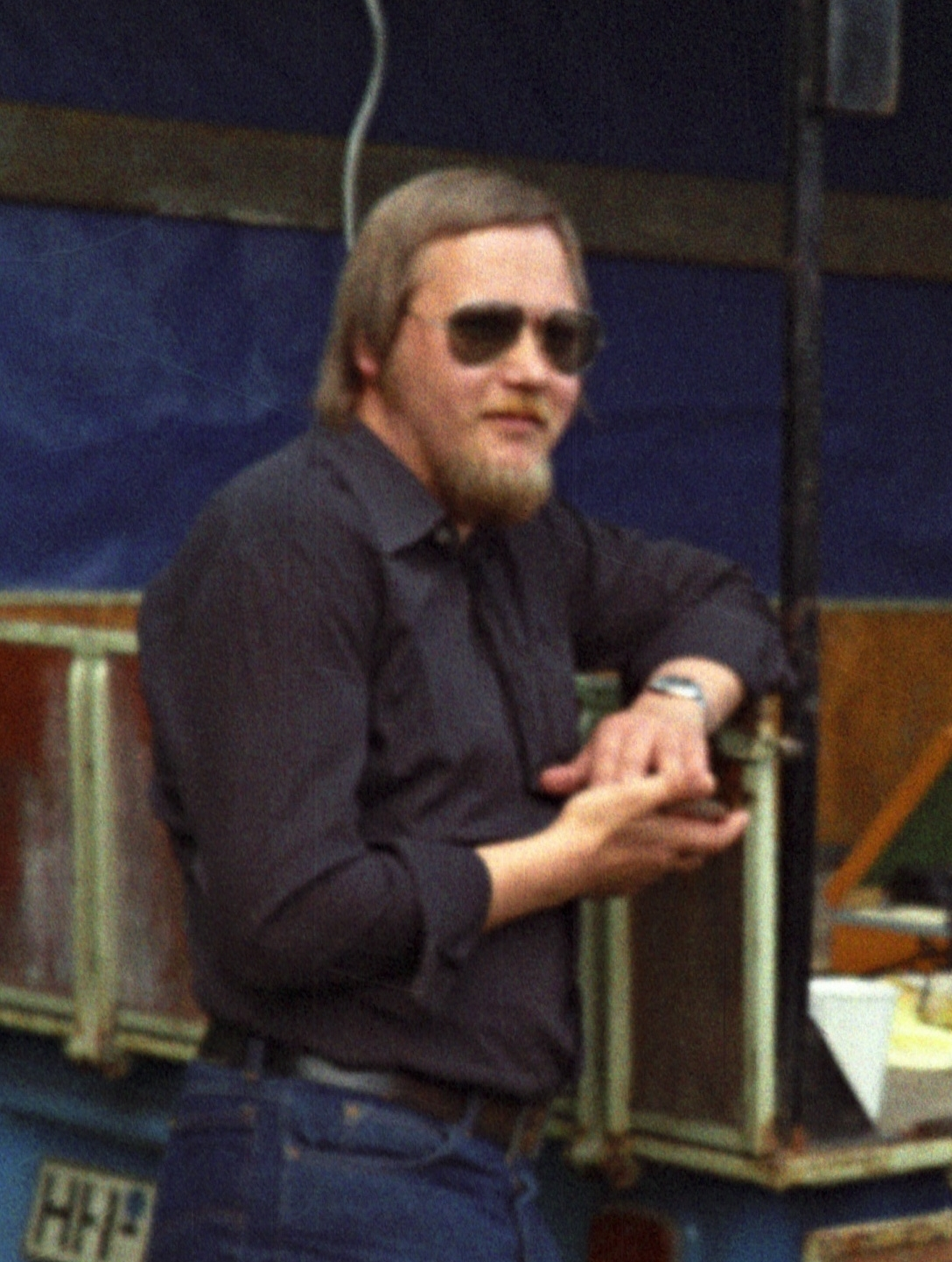 Gewerkschaftsfunktionär und Politiker Wolfgang Rose als Jungspund bei SPD-Stadtteilfest in Hamburg-Barmbek